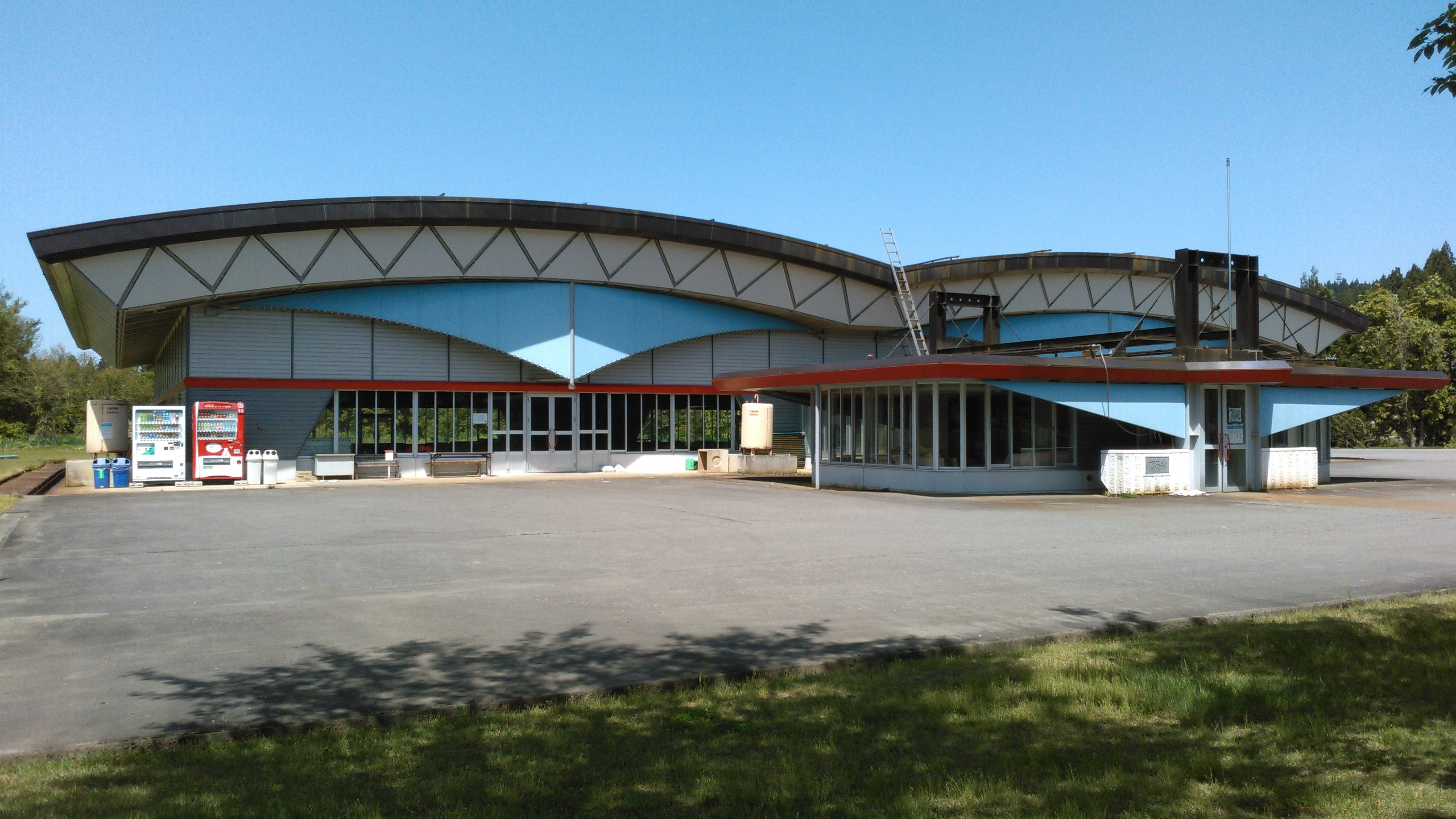 この画像は2018年5月25日投稿者によって新潟県長岡市川口中山（川口運動公園内）にて撮影された屋内ゲートボール場「すぱーく川口」の写真